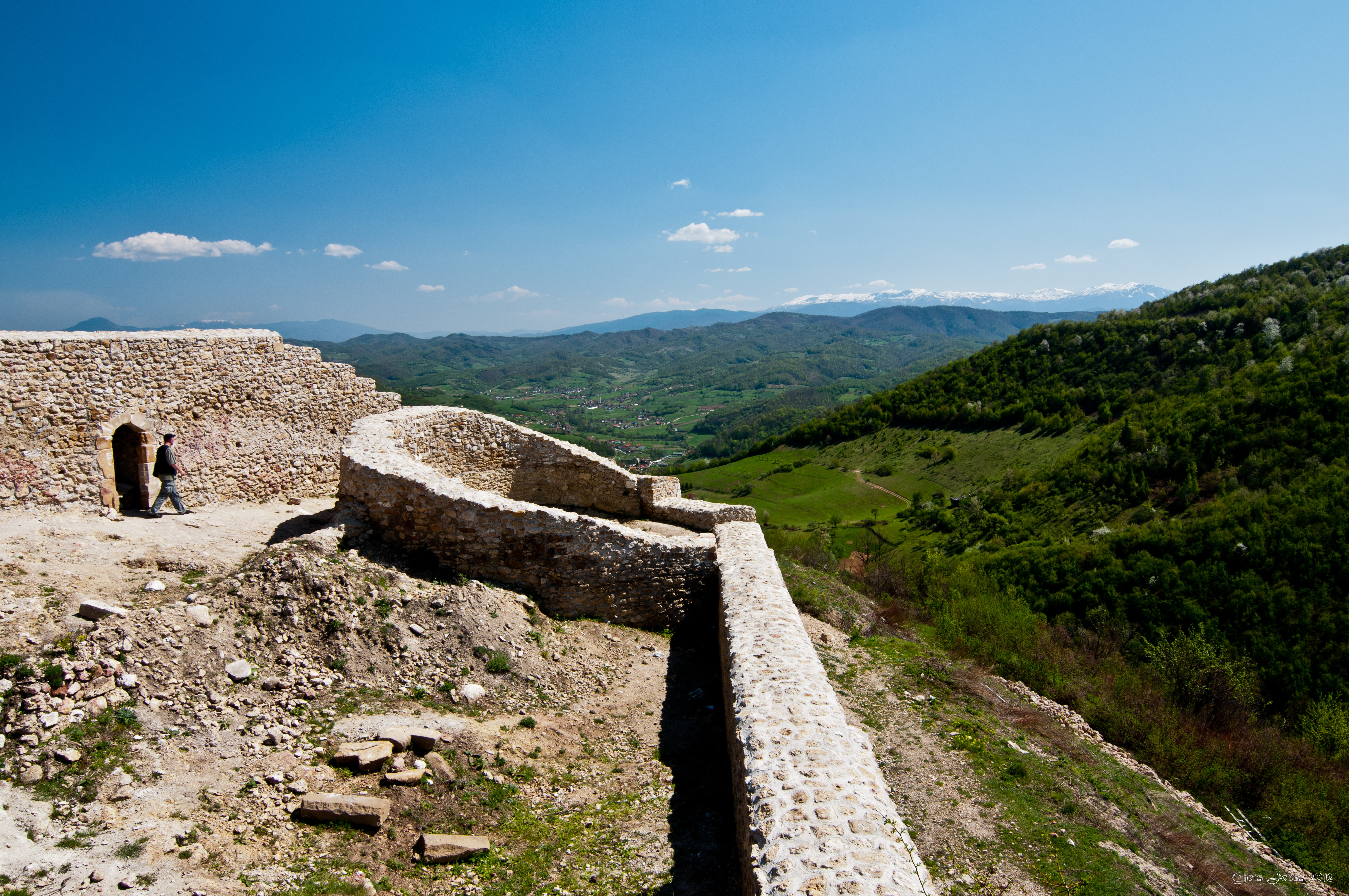 Visoko – View from Visočica